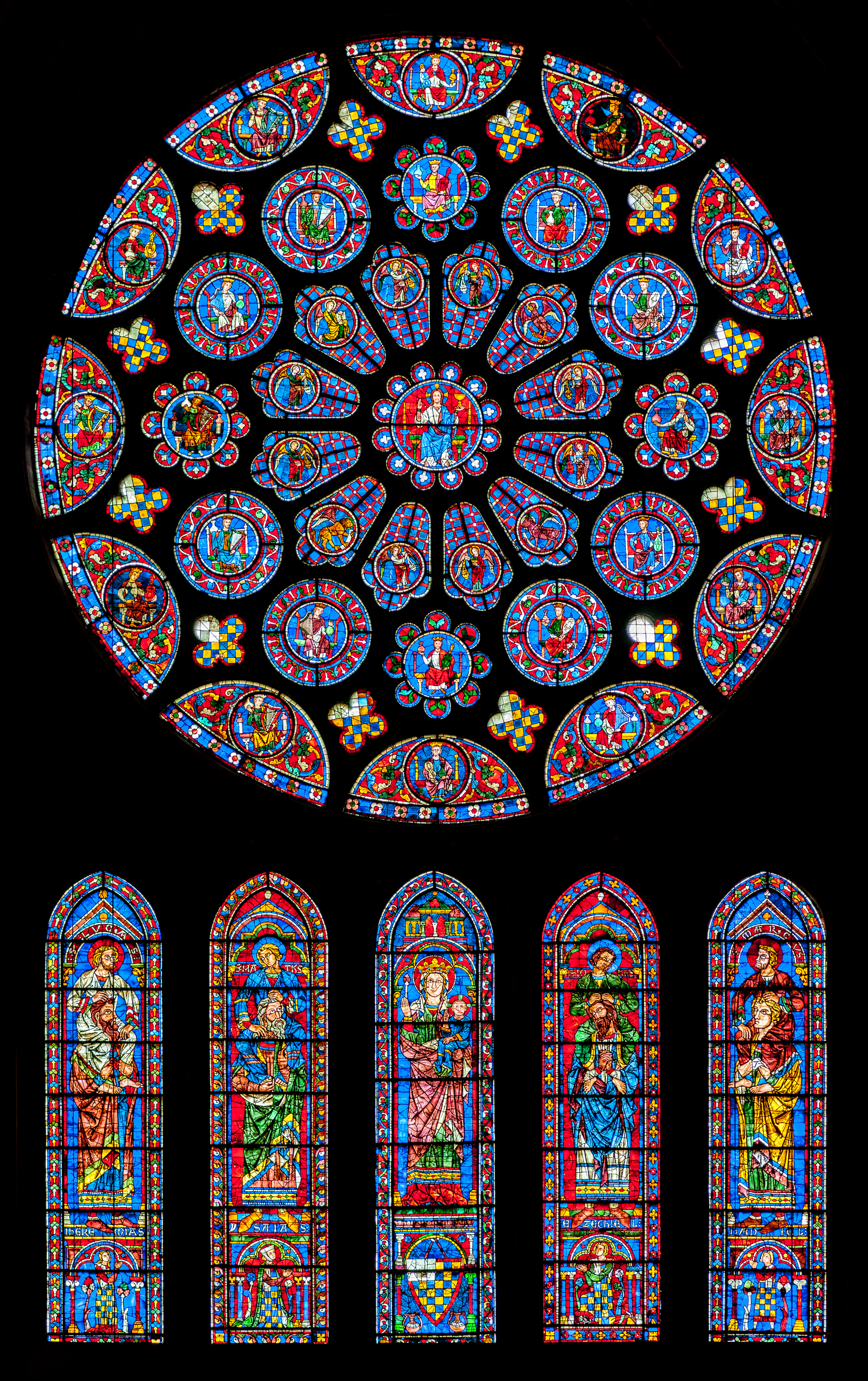 Fensterrosette Süd - 122